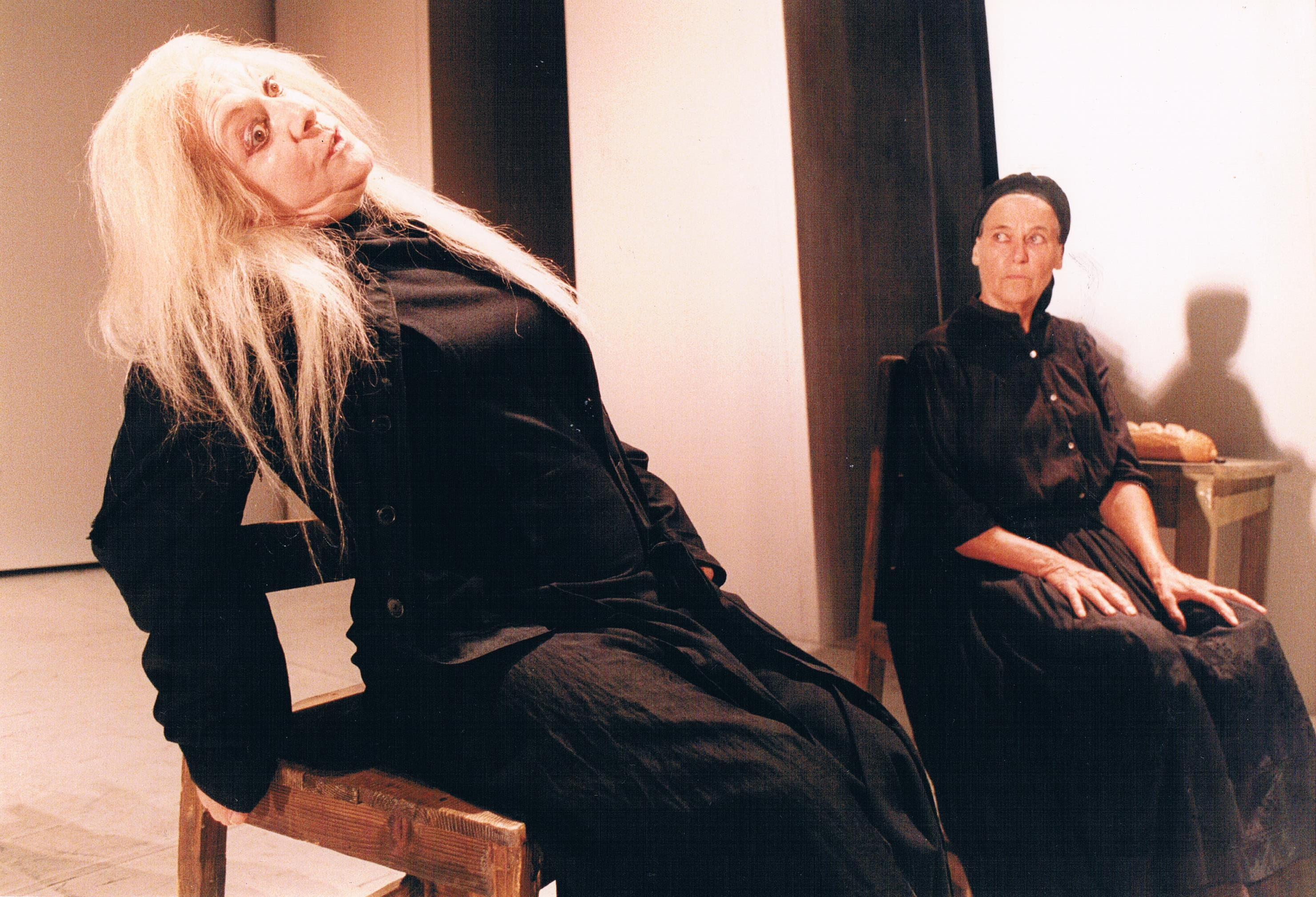 רבקה גור בהצגה "חתונת "הדמים". תיאטרון "הבימה"